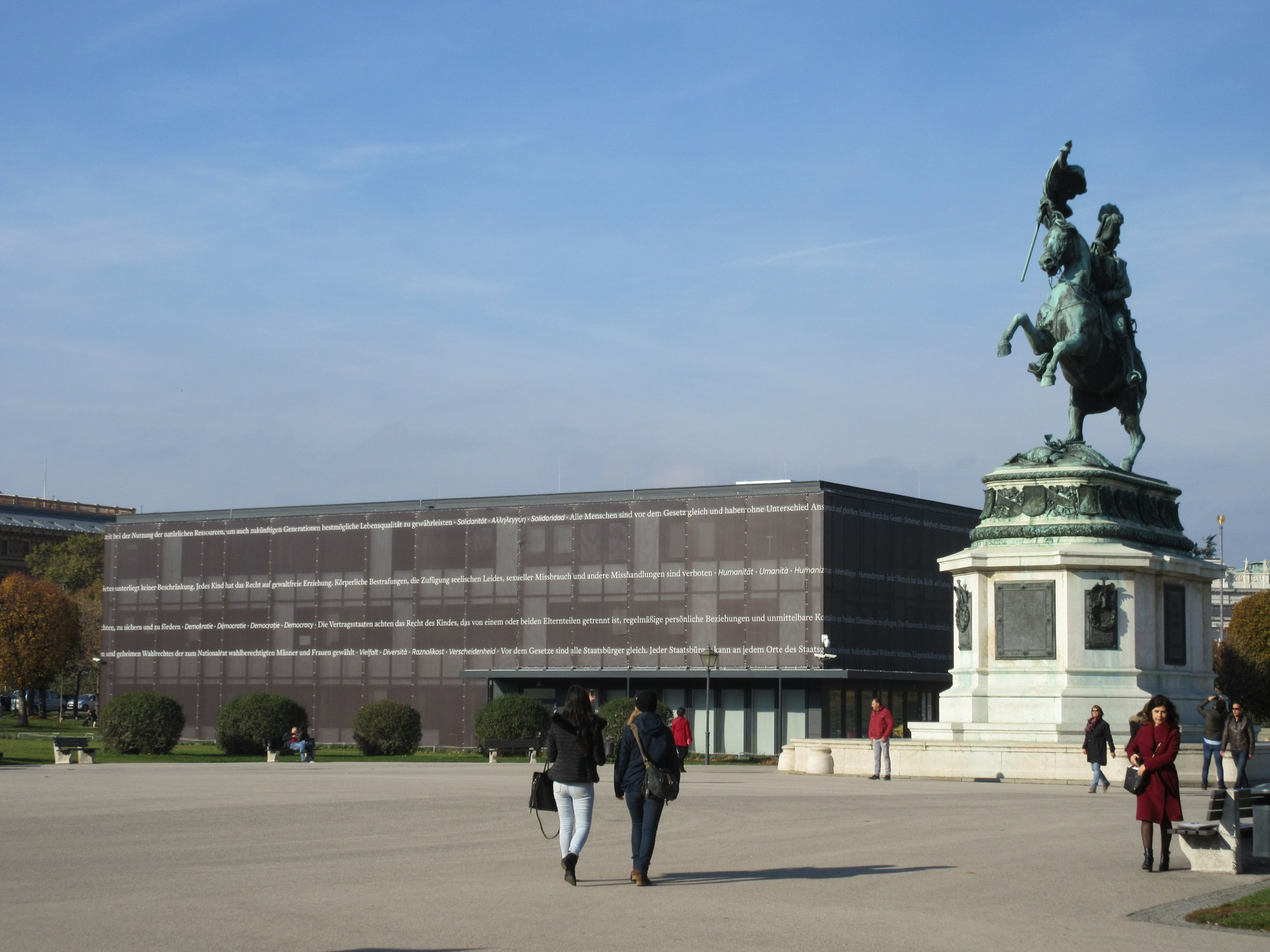 Pavillon Ring am Heldenplatz (temporäre Ausweichquartiere während der Sanierung des Hauses am Ring), mit dem Erzherzog-Karl-Denkmal.